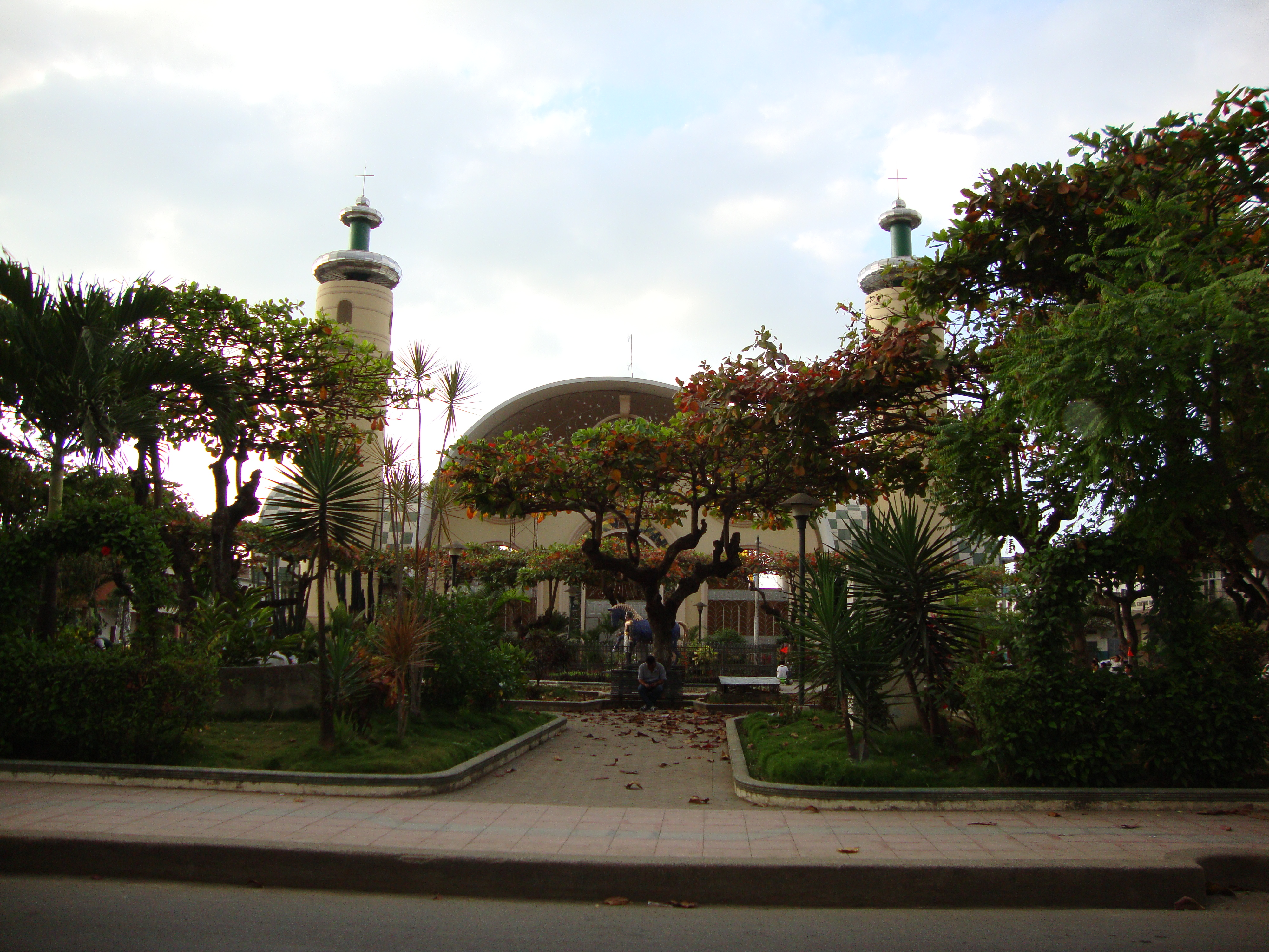 Iglesia San Agustín de Calceta